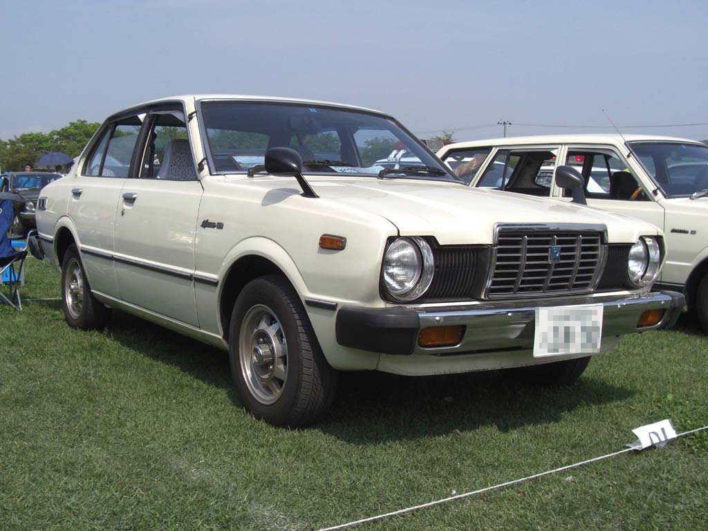 KE65型スプリンター